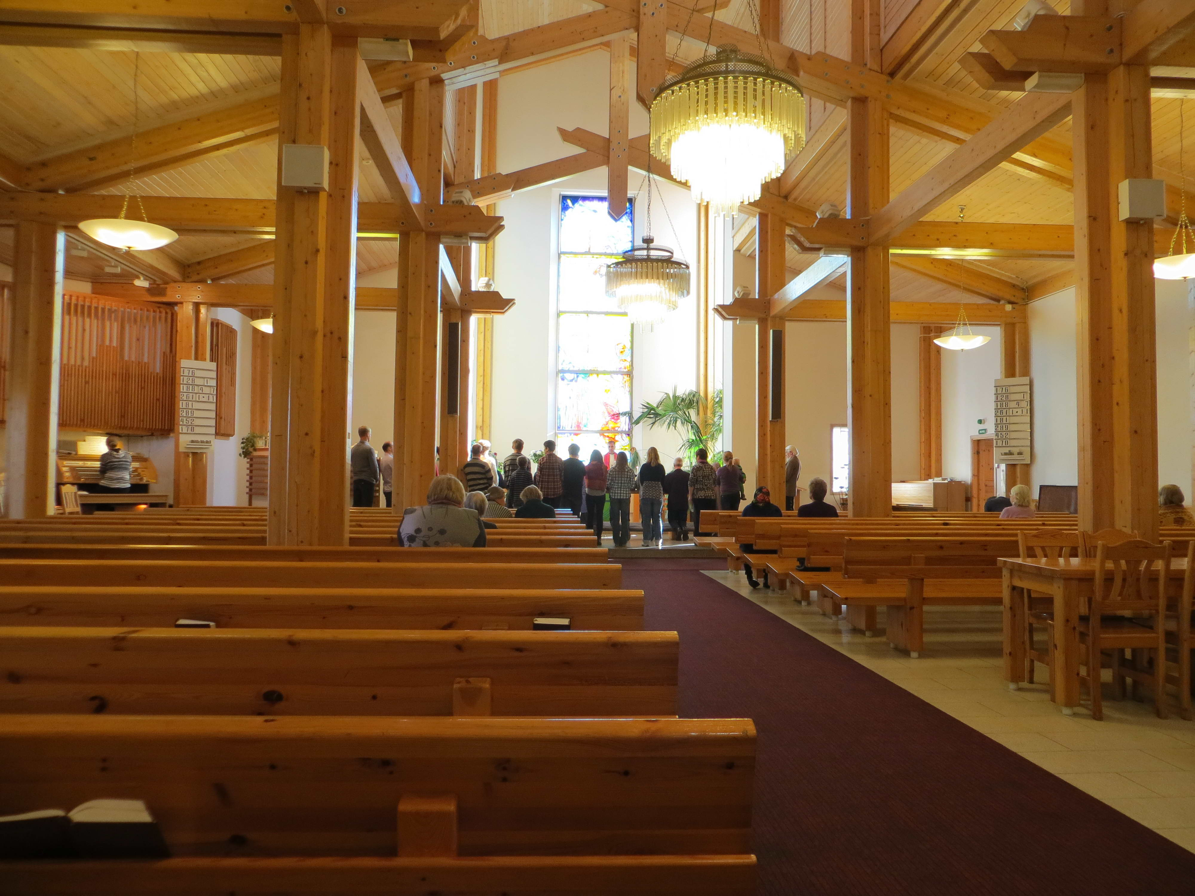 Интерьер лютеранской церкви святого Георгия прихода Келтто Церкви Ингрии.